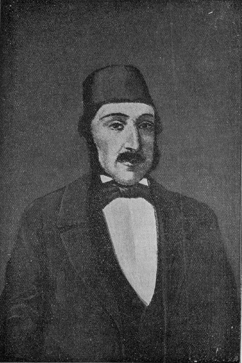 Anton Pann - gravură de epocă